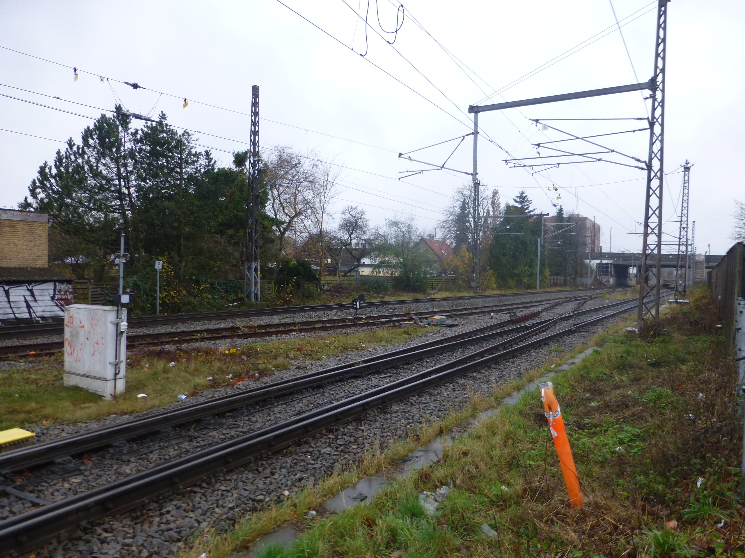 Herlev Station on Frederikssundsbanen in Copenhagen, Denmark.